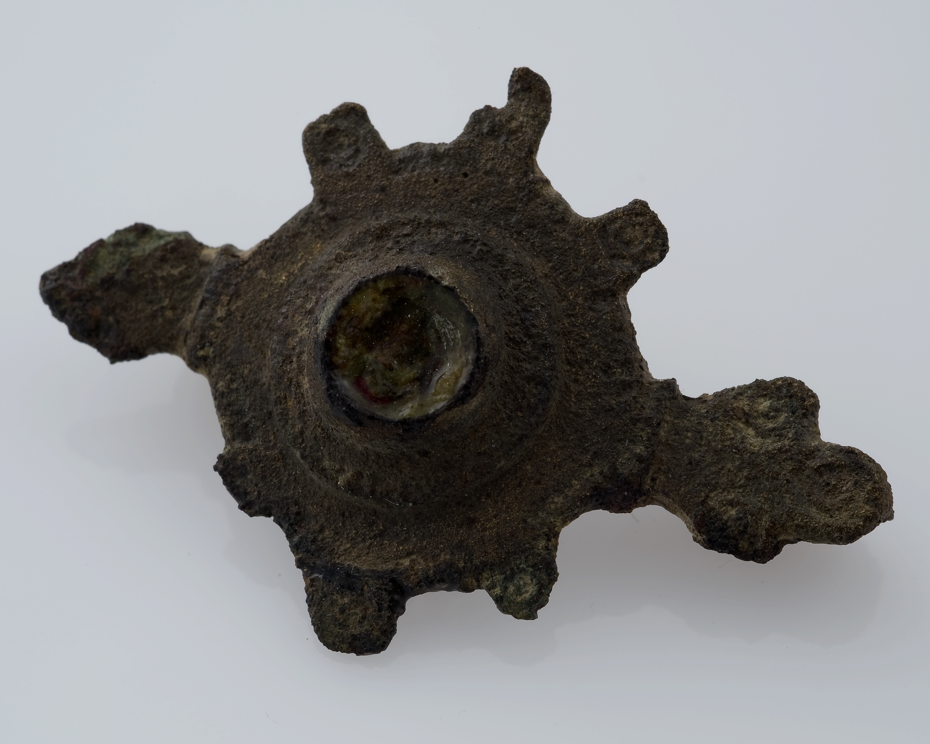 Scharnierfibula. Bronzen fibula of mantelspeld uit de Romeinse tijd. Getande cirkel, in een gietmal gevormd. Aan de onderzijde resten van montuur van een speld en borgoog. Halfronde bolling in het midden, waarop een kleine email knop. Bodemvondst Korte Laanweg, Spijkenise, vlak VIII, 1976. Formaat: lg 3,6 / br 2,5 In collectie van: Historisch Museum Rotterdam